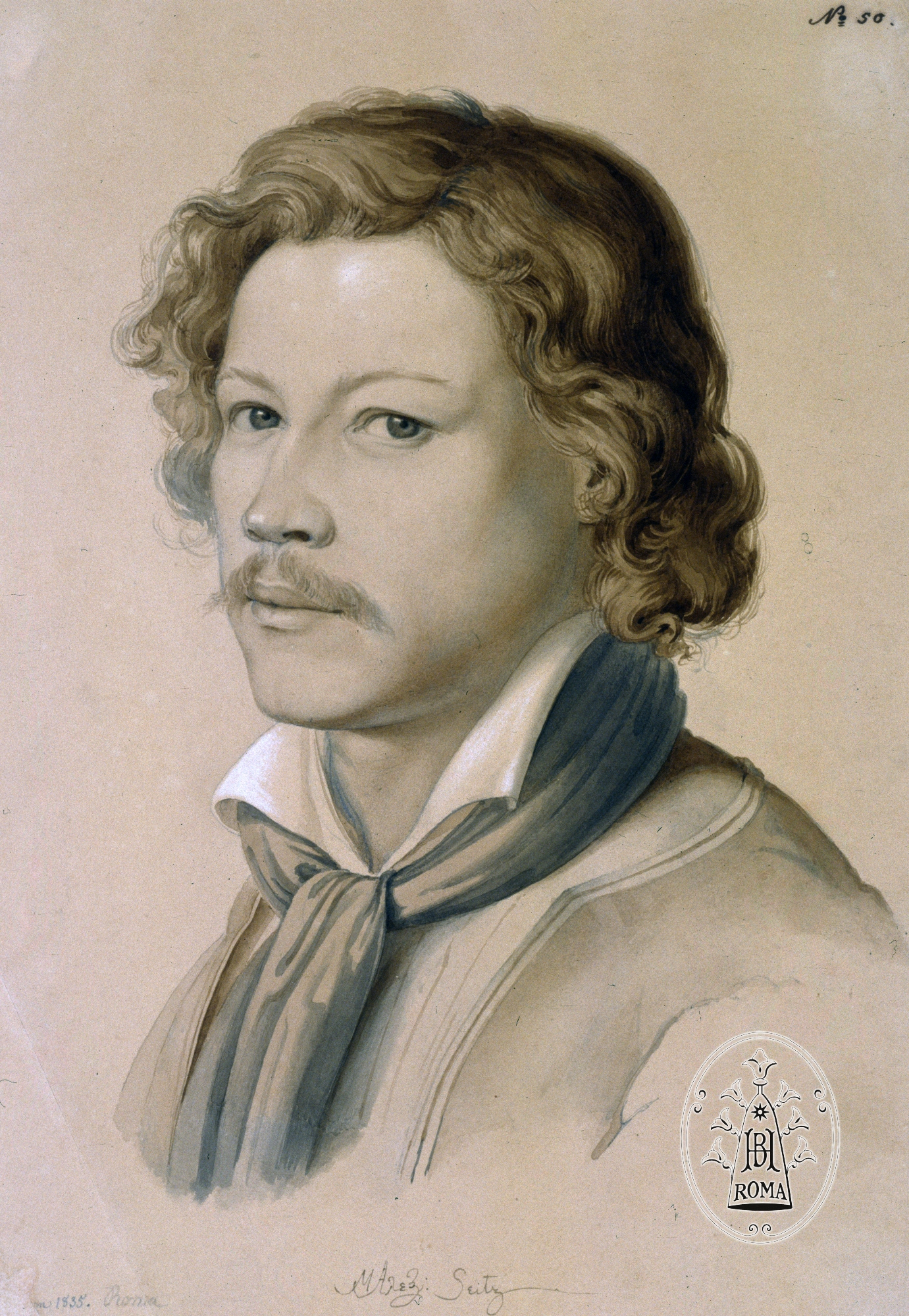 Porträt Alexander Maximilian Seitz, gezeichnet von Johann Martin von Rhoden, Rom 1835